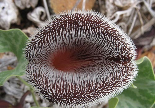 Aristolochia chilensis